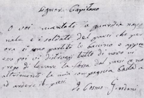 biglietto ricattatorio del brigante Cosimo Giordano